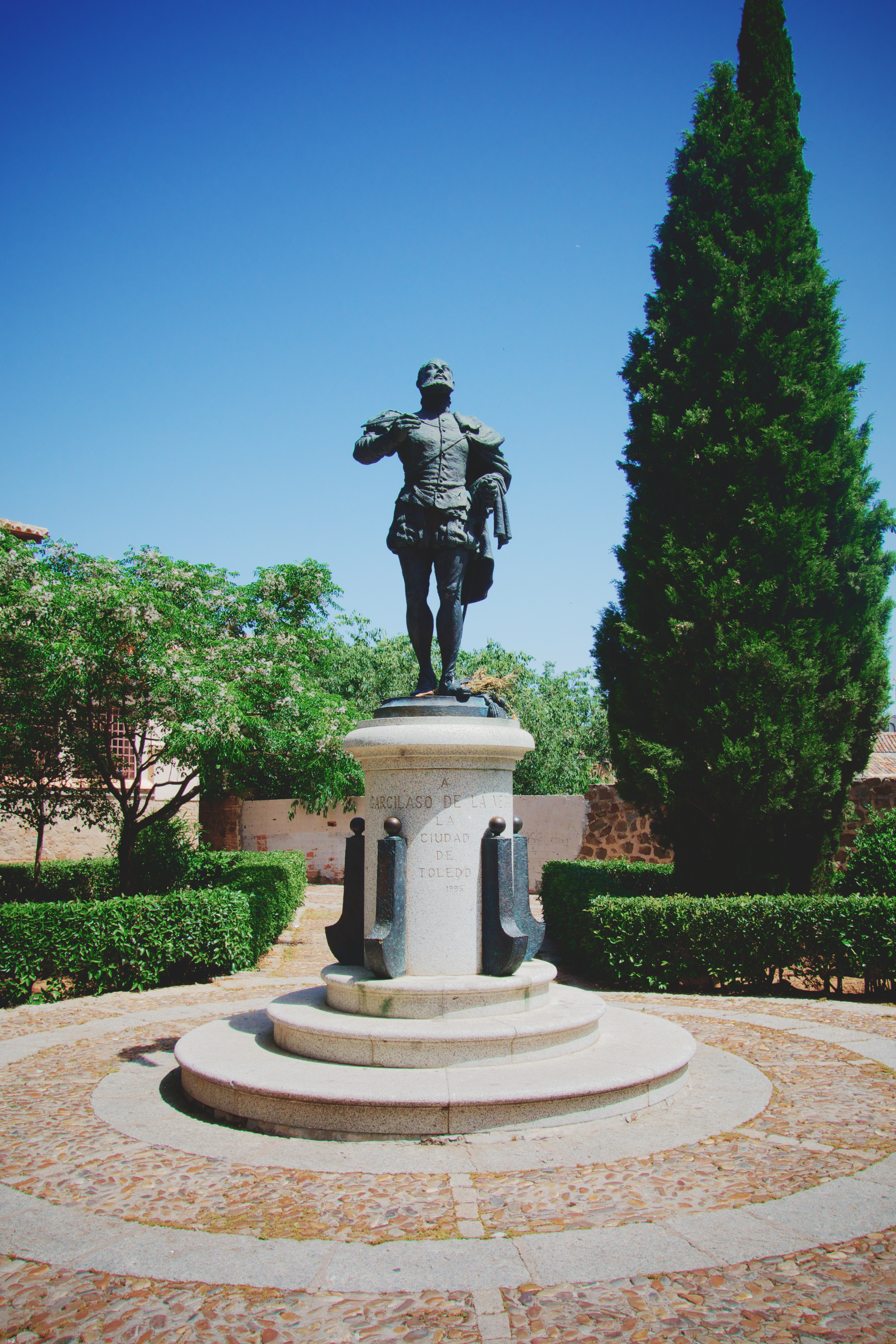 Statue: Toledo to Garcilaso de la Vega